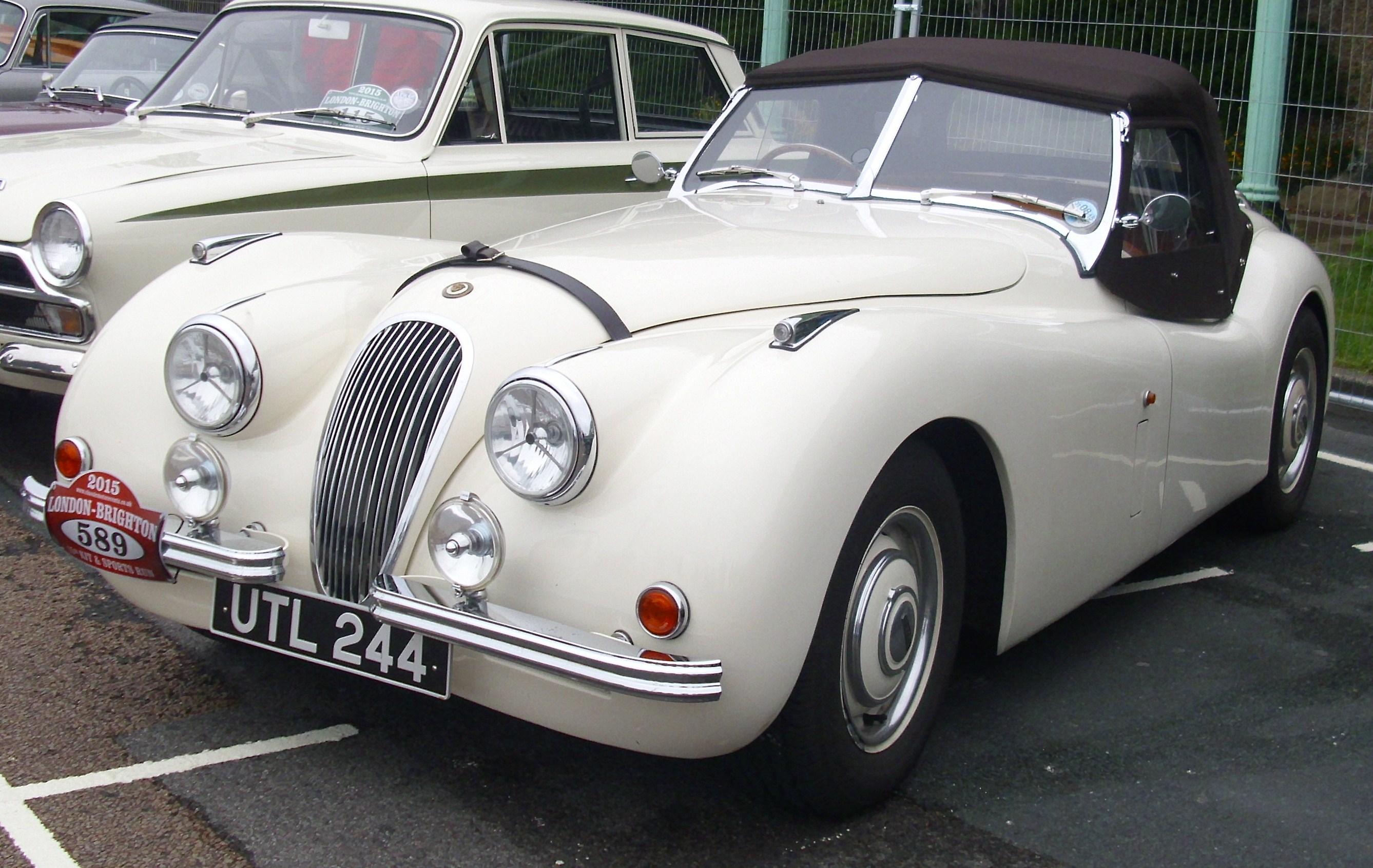 Nostalgia XK 120 2005